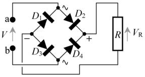 Diagram med diverste bogstav- og tal-markeringer man kan henvise til i artikelteksten. Lavet under brug af MS Word (!)